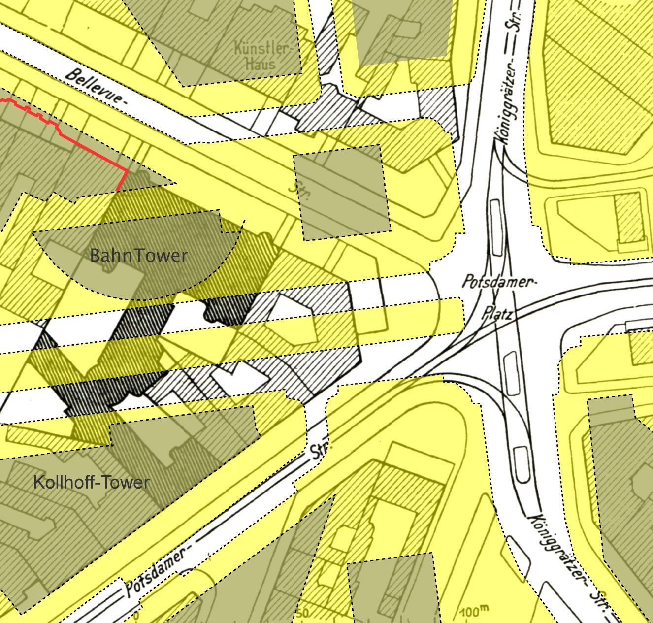 Berlin - Weinhaus Rheingold: Lageplan 1907 überlagert mit aktueller Bebauung